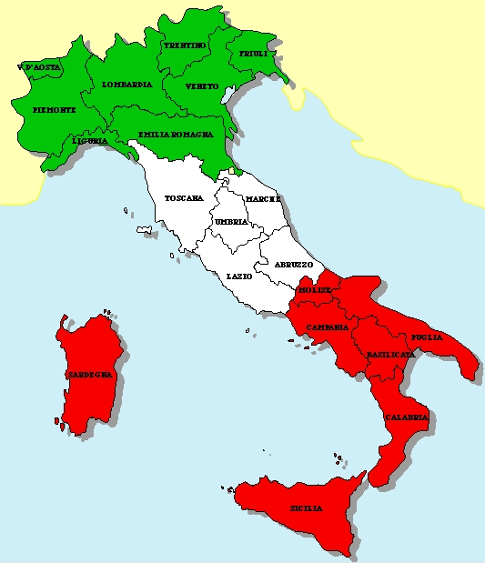 Mapa das três regiões italianas: Norte, Sul e Central.